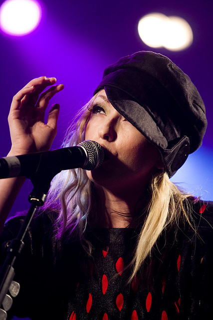 Katie White dos The Ting Tings ao vivo no Festival Optimus Alive, em Oeiras.